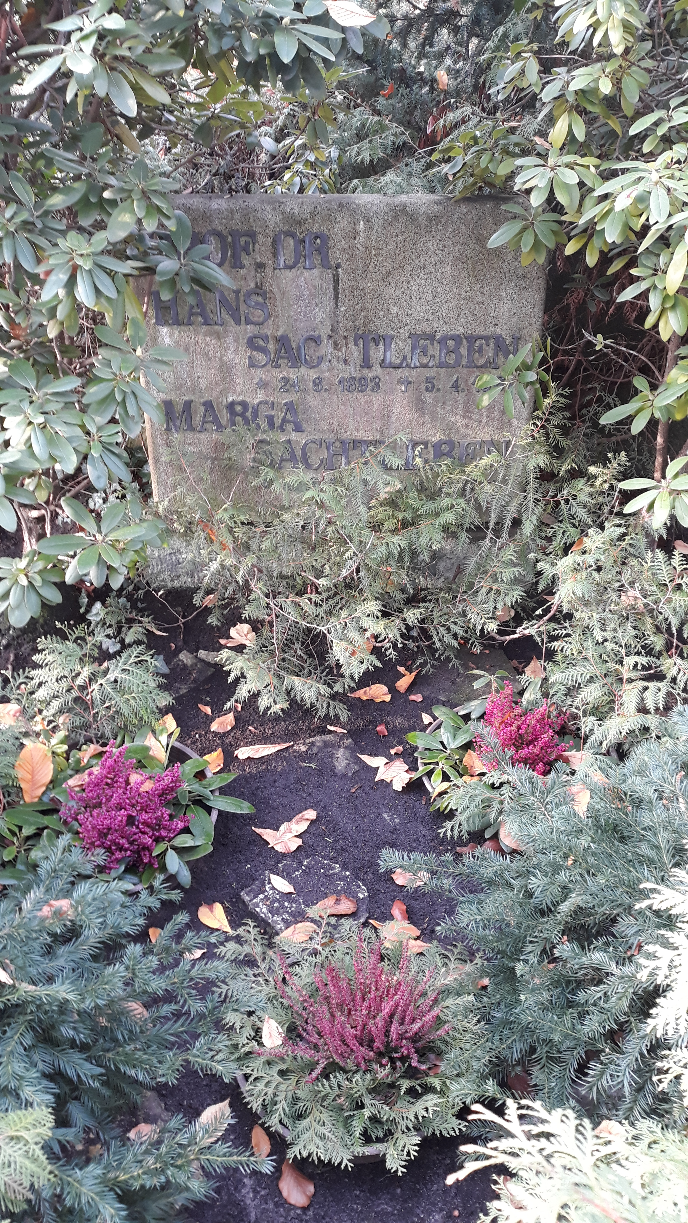 Das Grab des deutschen Zoologen Hans Sachtleben und seiner Ehefrau Marga auf dem Friedhof Friedrichshagen in Berlin.